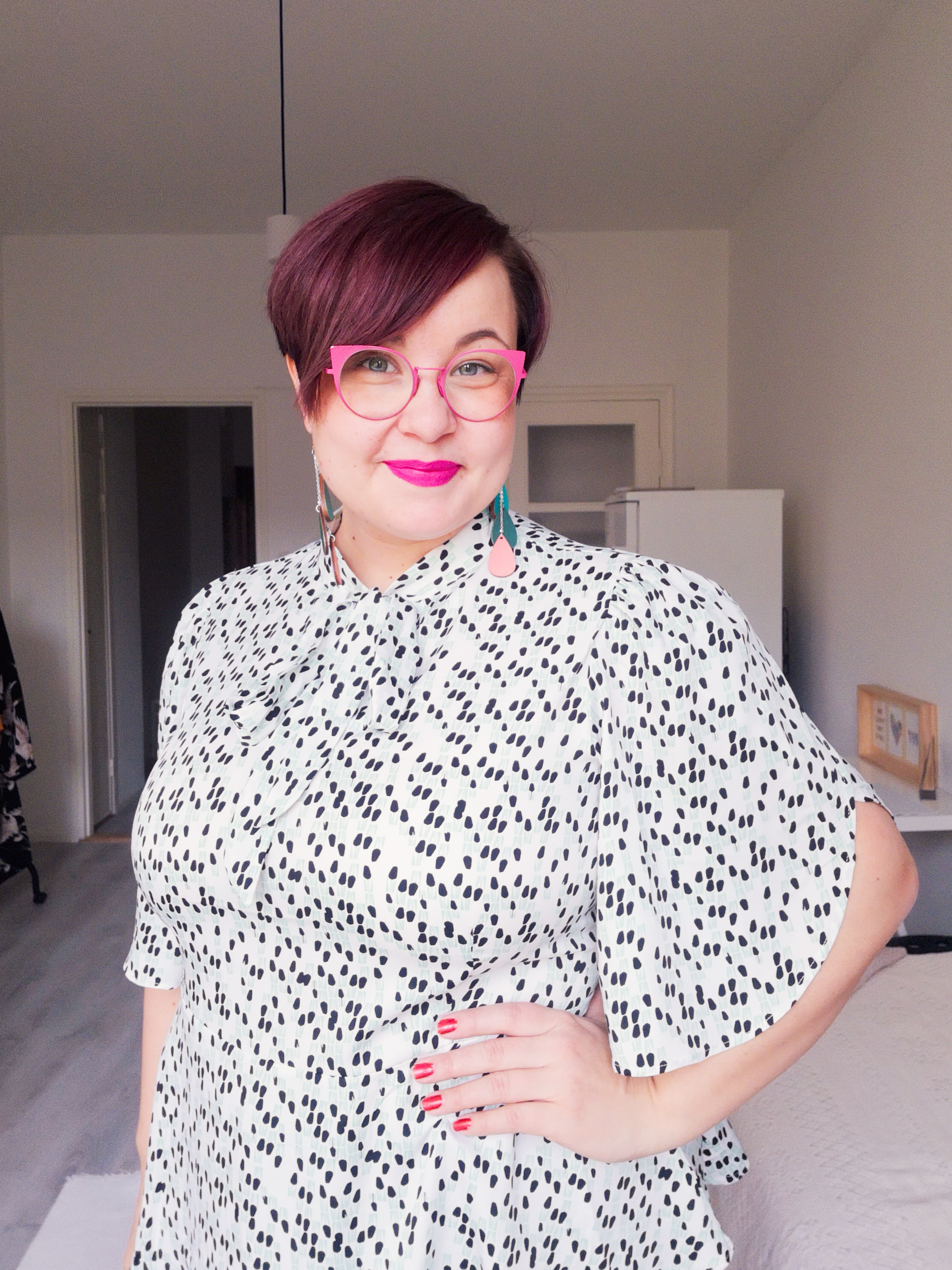 Emmi Nuorgam